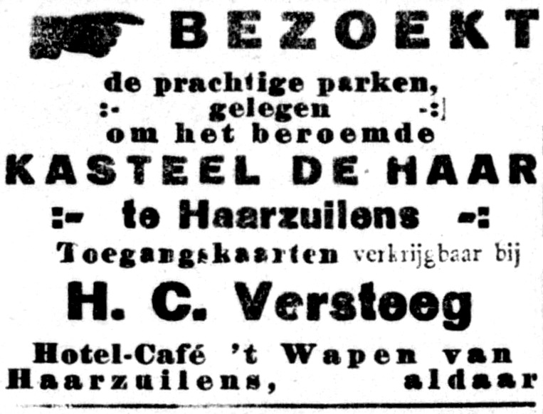 BEZOEKT de prachtige parken gelegen om het beroemde KASTEEL DE HAAR te Haarzuilens. Afkomstig uit De Gooi- en Eemlander, zaterdag 19 juni 1915, [p. 3].